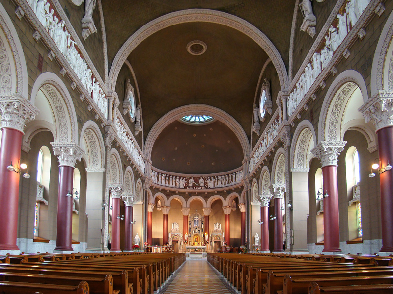 Église Nativité-de-la-Sainte-Vierge-d’Hochelaga, Montréal, Québec, Canada.